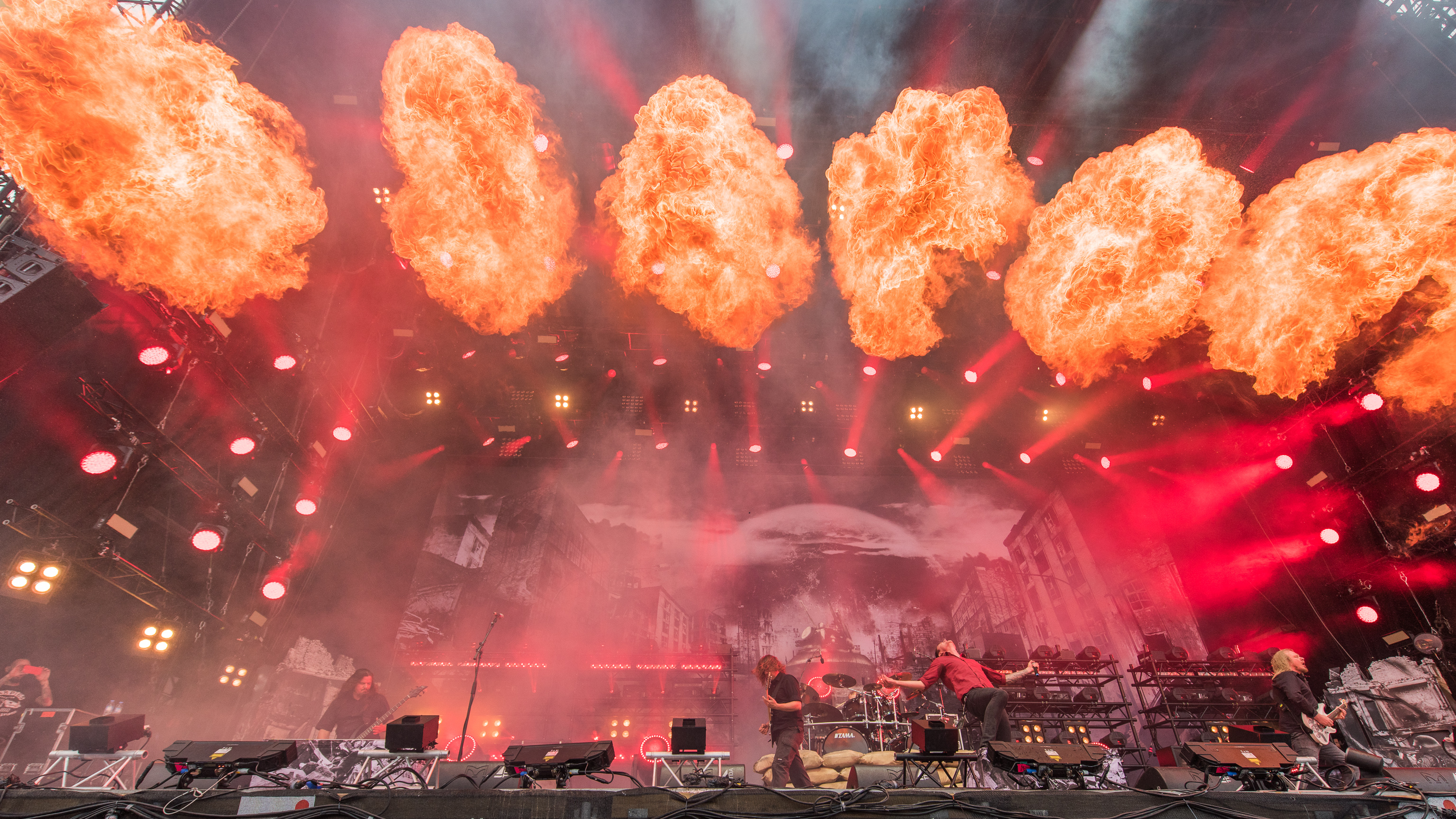 ARGO-Konzerte,Alexander Dietz,Beck's Park Stage,Eric Bischoff,Festival,Heaven Shall Burn,Konzert,Livekonzert,Livemusik,Maik Weichert,Marcus Bischoff,Musik,RiP,Rock im Park 2016